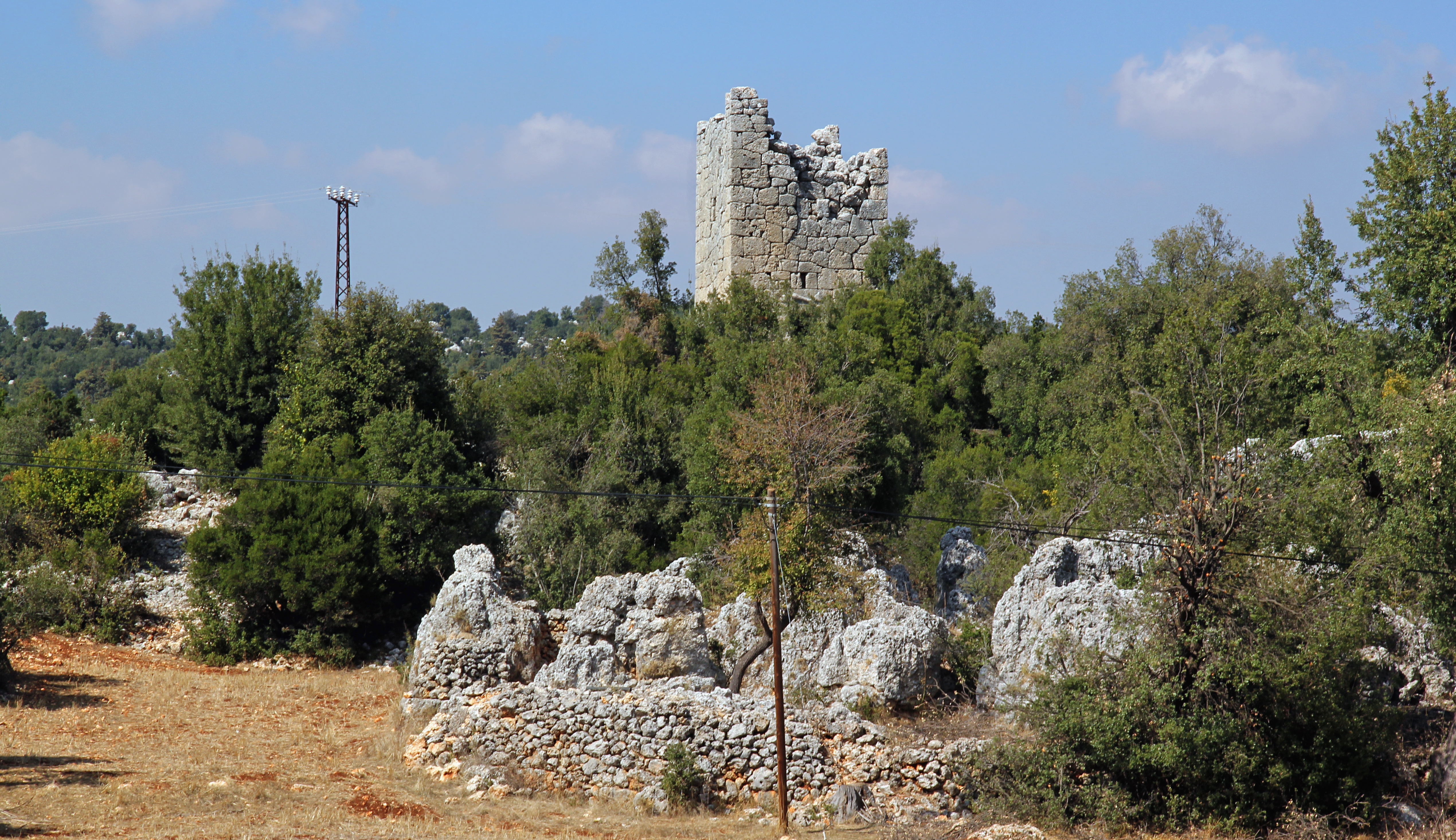 Hellenistischer Turm von Yeğenli, nördlich von Silifke, Provinz Mersin, Südtürkei, Ansicht von Südosten